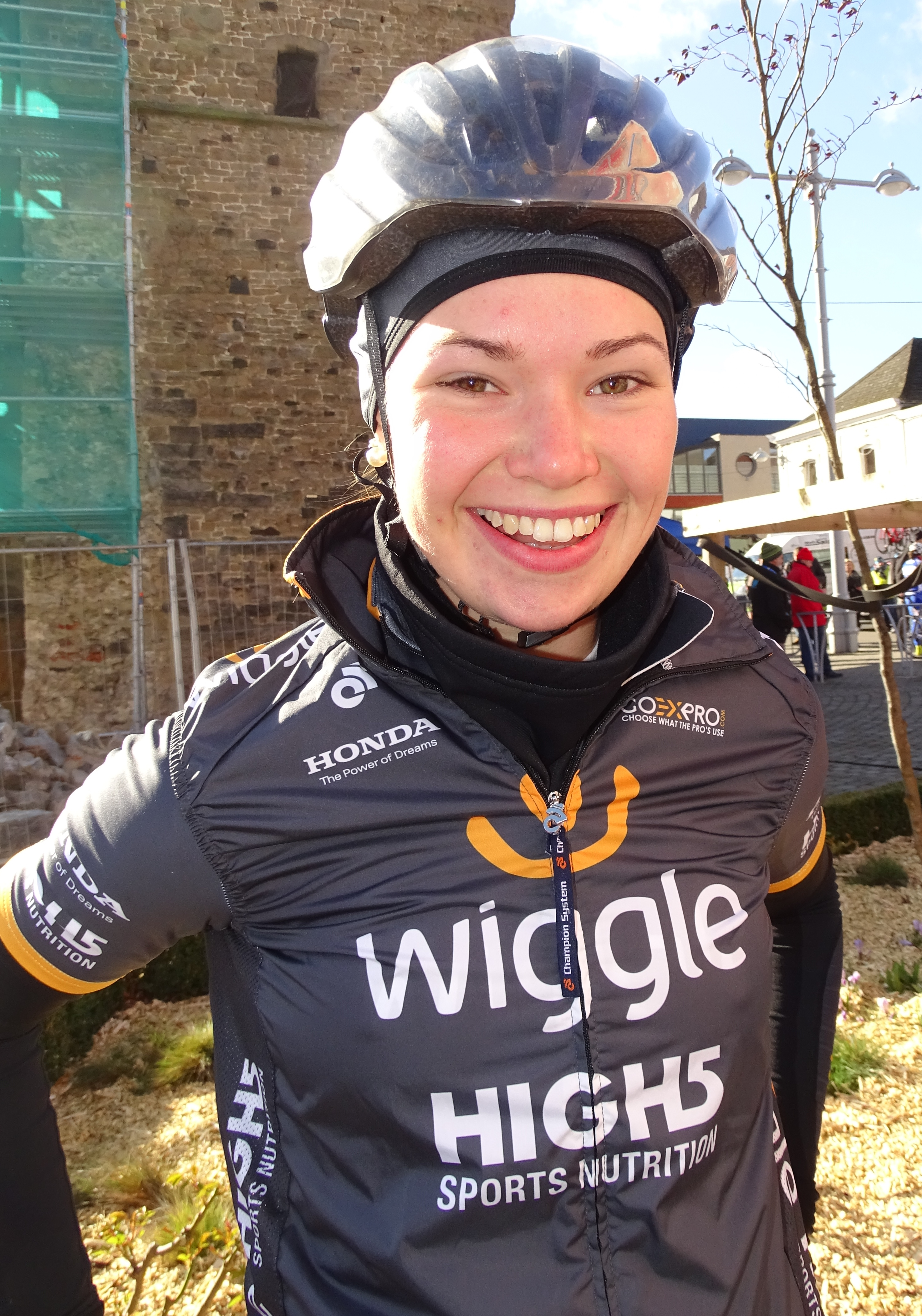 Reportage réalisé le mercredi 2 mars à l'occasion du départ du Samyn des Dames 2016 et du Samyn 2016 à Quaregnon, Belgique.